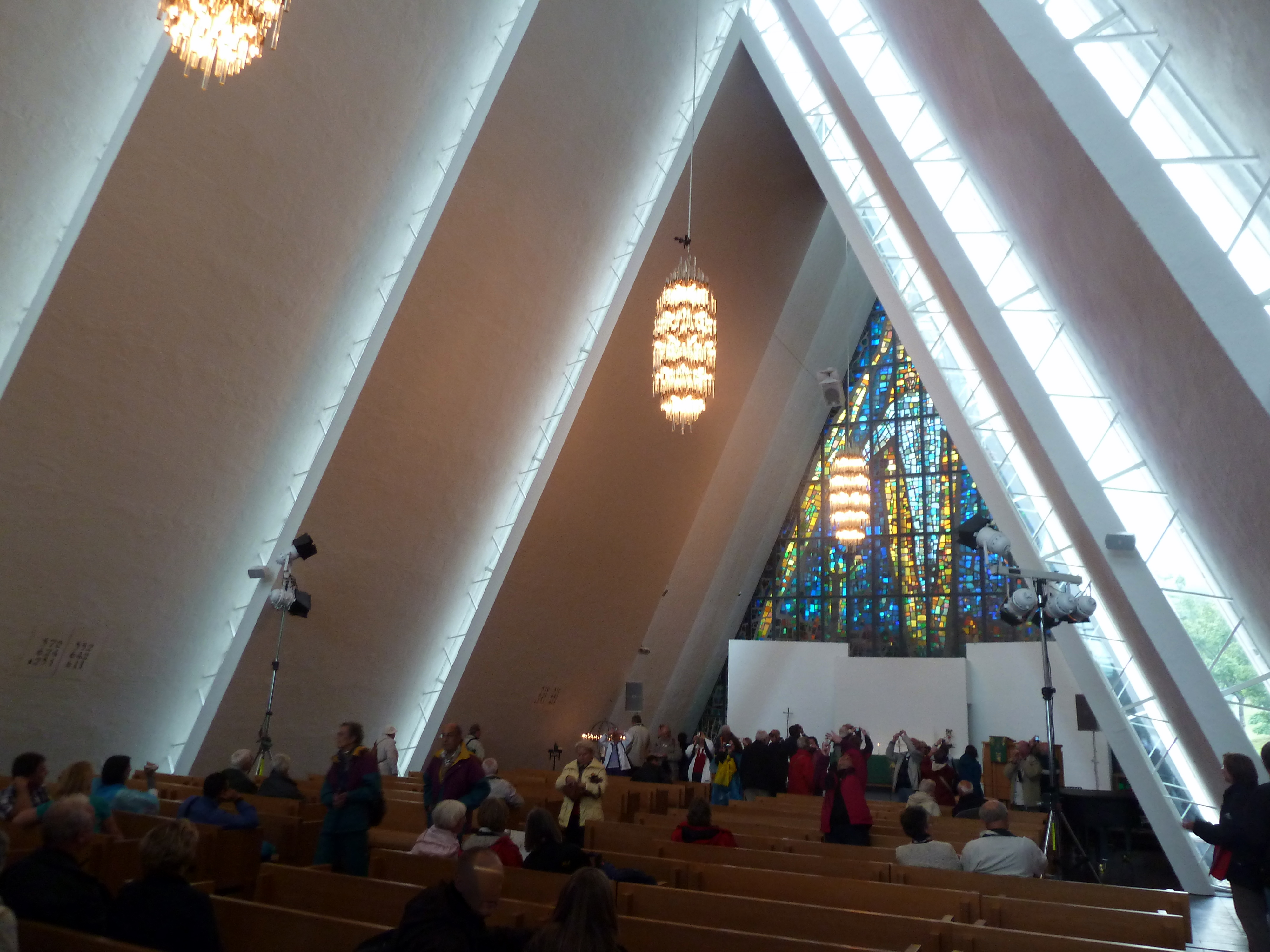 2010-08-02 - Tromsø - Innenansicht der Eismeerkathedrale